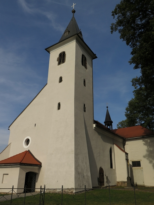 Kostel svatého Jana Křtitele, Záblatí (okres Prachatice).